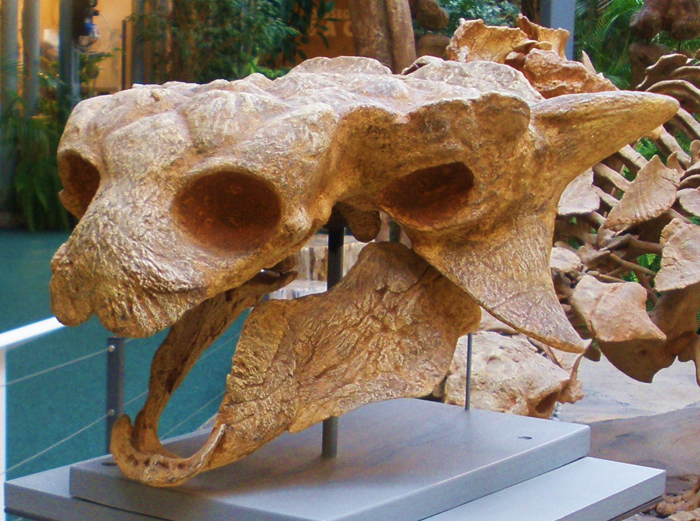 Skull of Minotaurasaurus